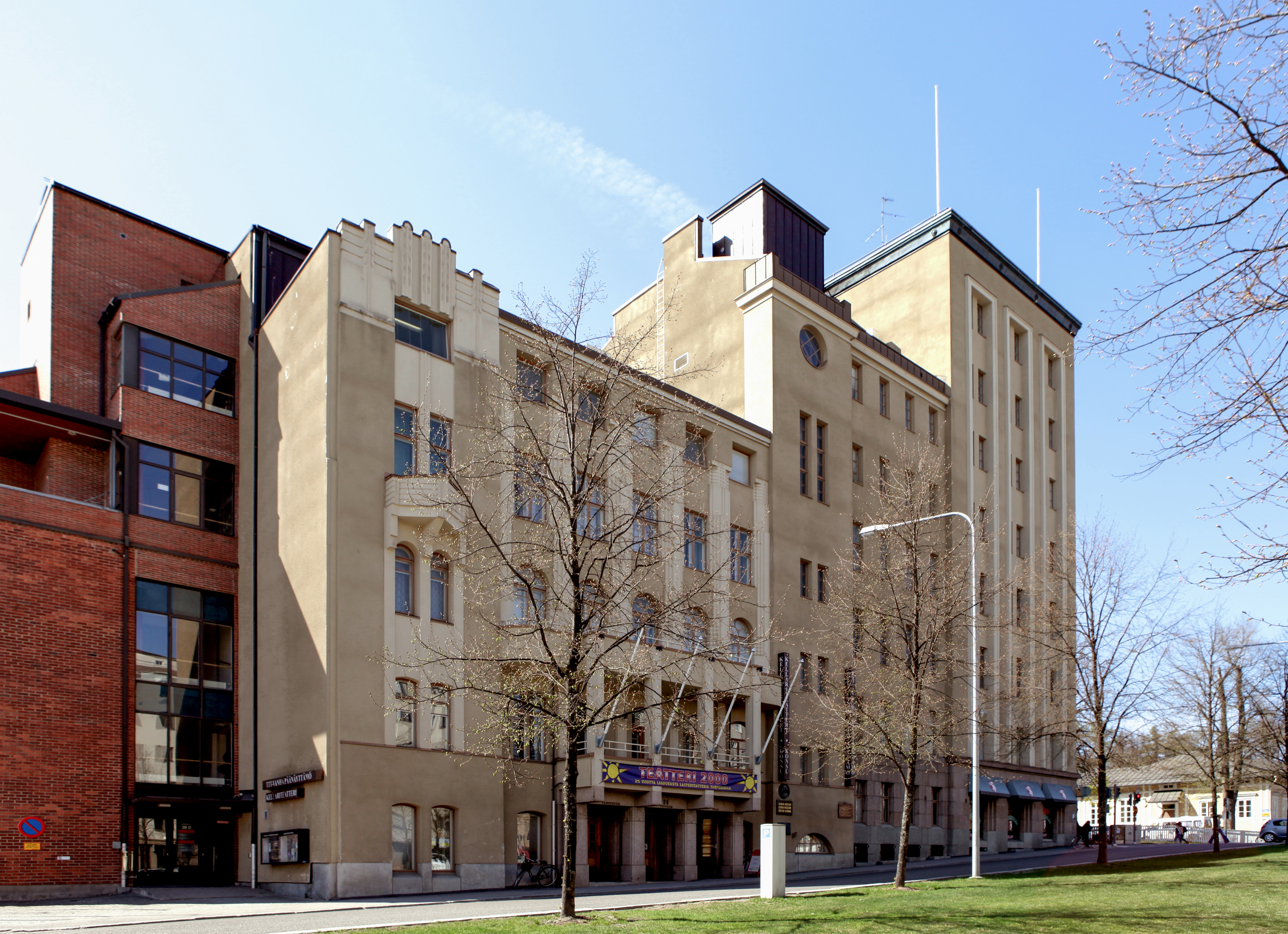 Tampereen työväentalo. Hämeenpuisto 28.